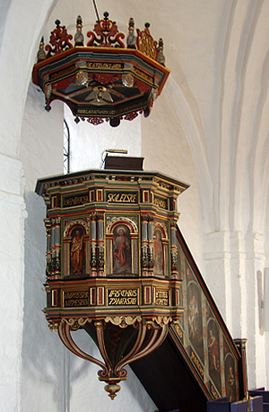 Odder Kirke - Prædikestol